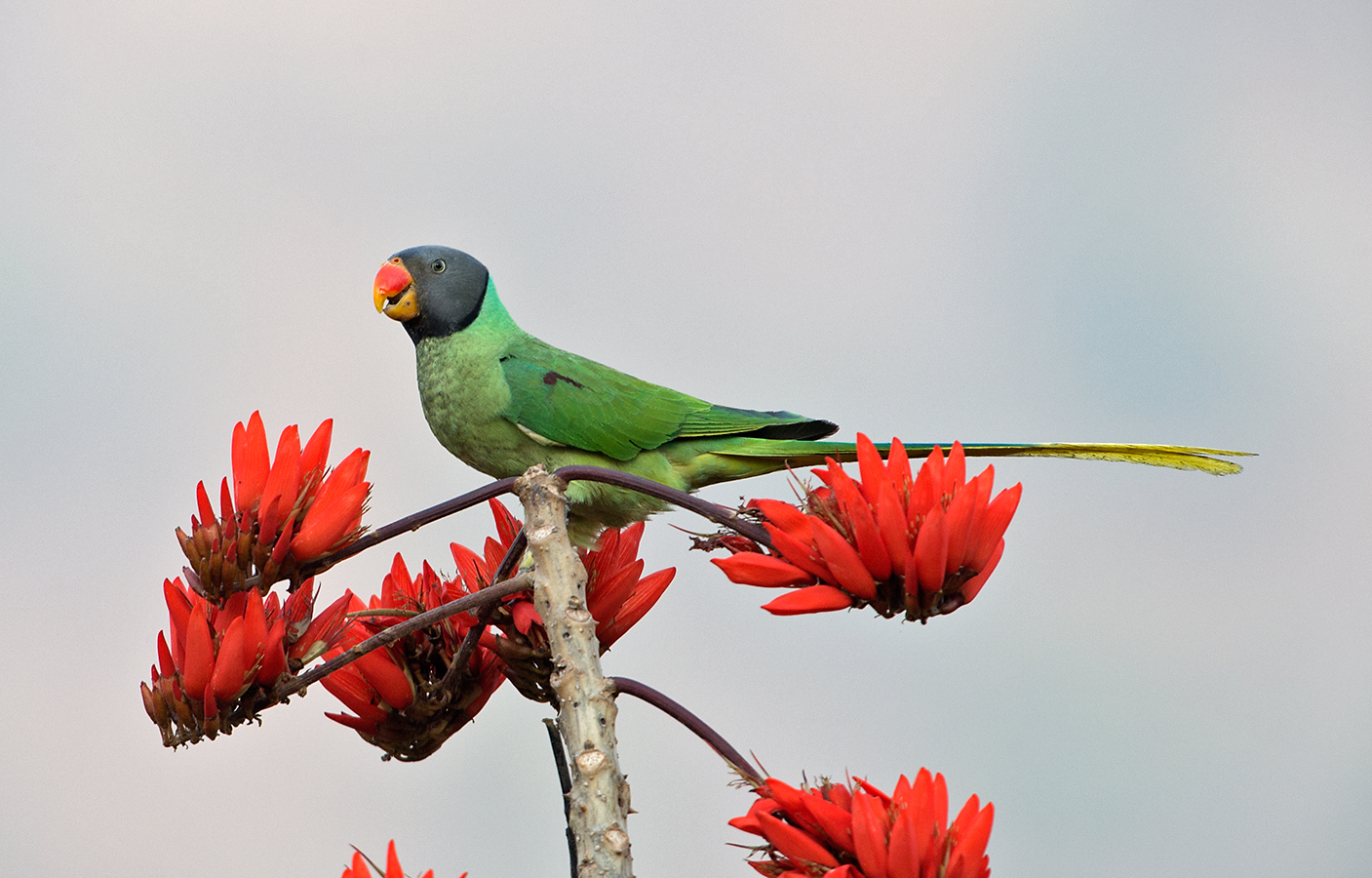 Psittacula himalayana Male